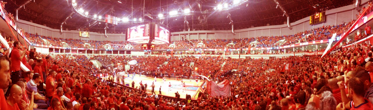 תמונה פנורמית של הפיס ארנה בירושלים בזמן גמר הפלייאוף 2015. מבט מיציע 2